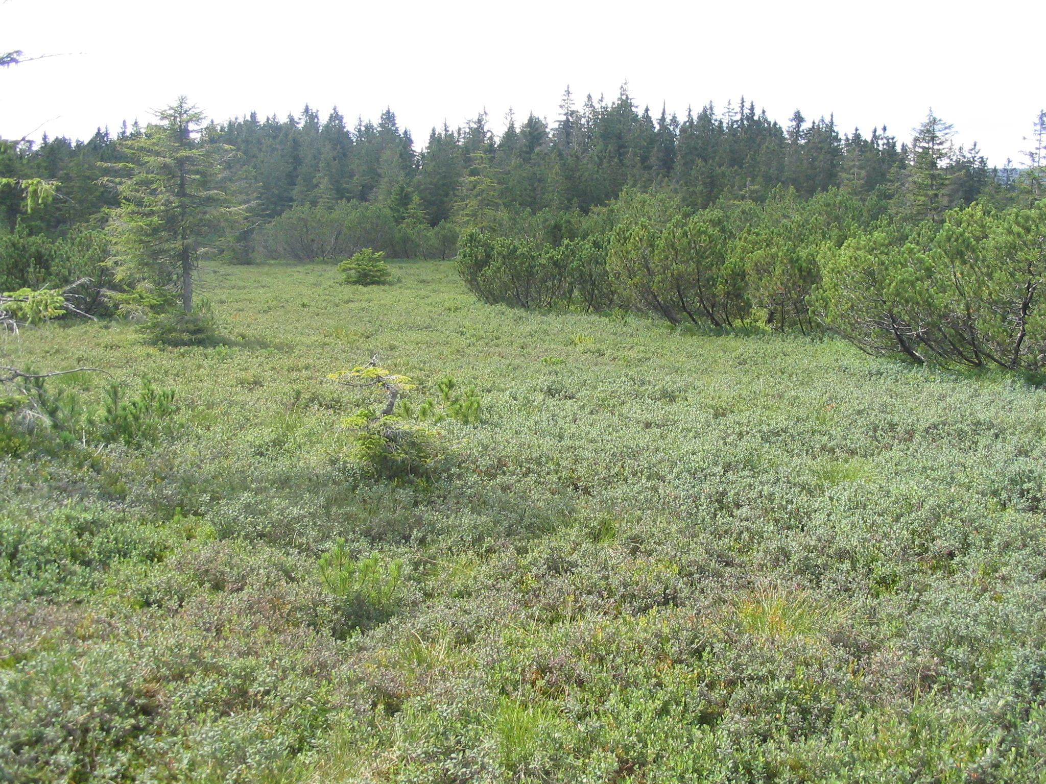 Latschenfilz im Nationalpark Bayerischer Wald, aufgenommen von Dr. Hagen Graebner am 31.07.2007